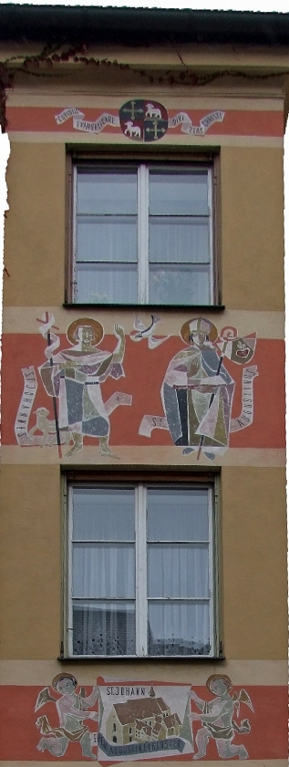 Erker des ehemaligen Augustinerklosters Memmingen